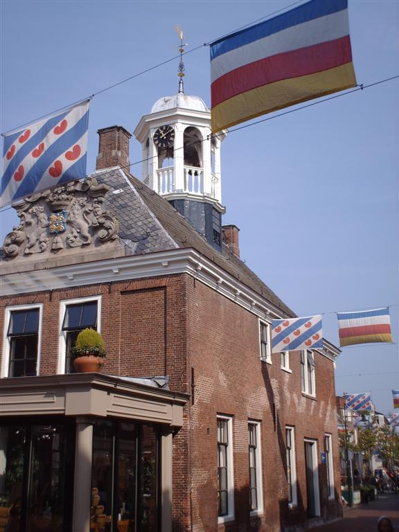 Waag in Dokkum